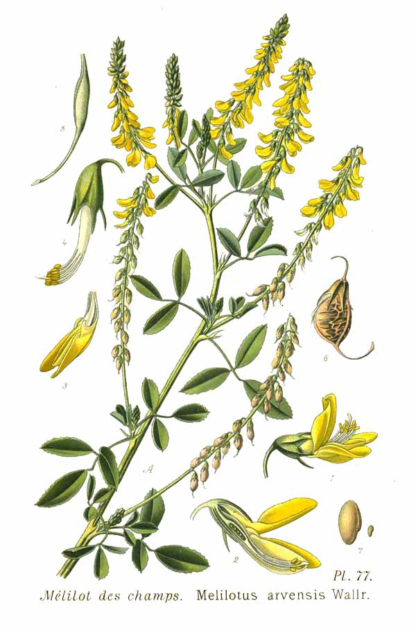 Melilotus arvensis Wallr.